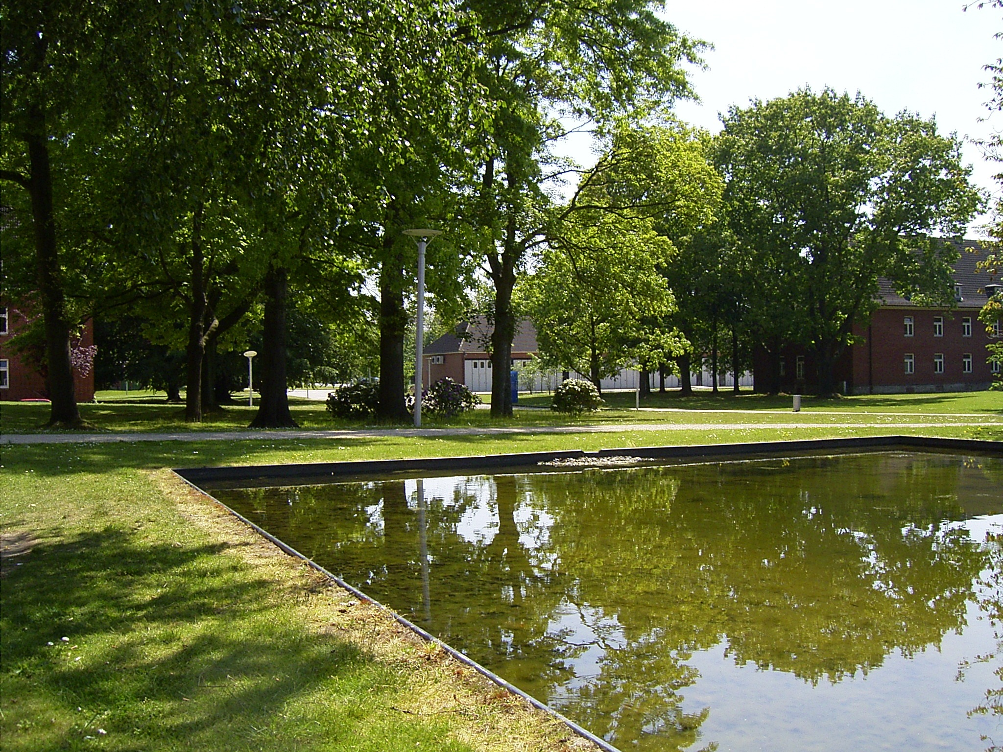 International University Bremen (Original text: (Campus der IUB.))